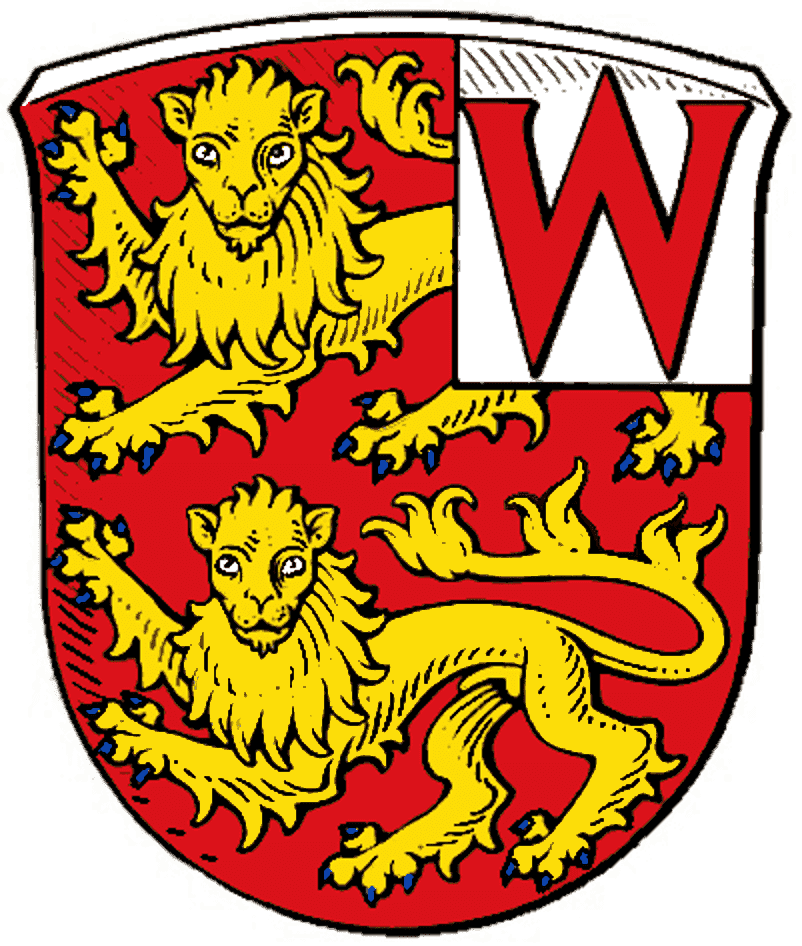 Wappen von Wehrheim